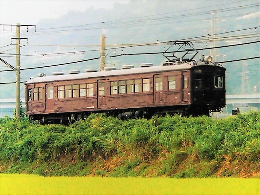 鉄道省モハ40形電車 40054